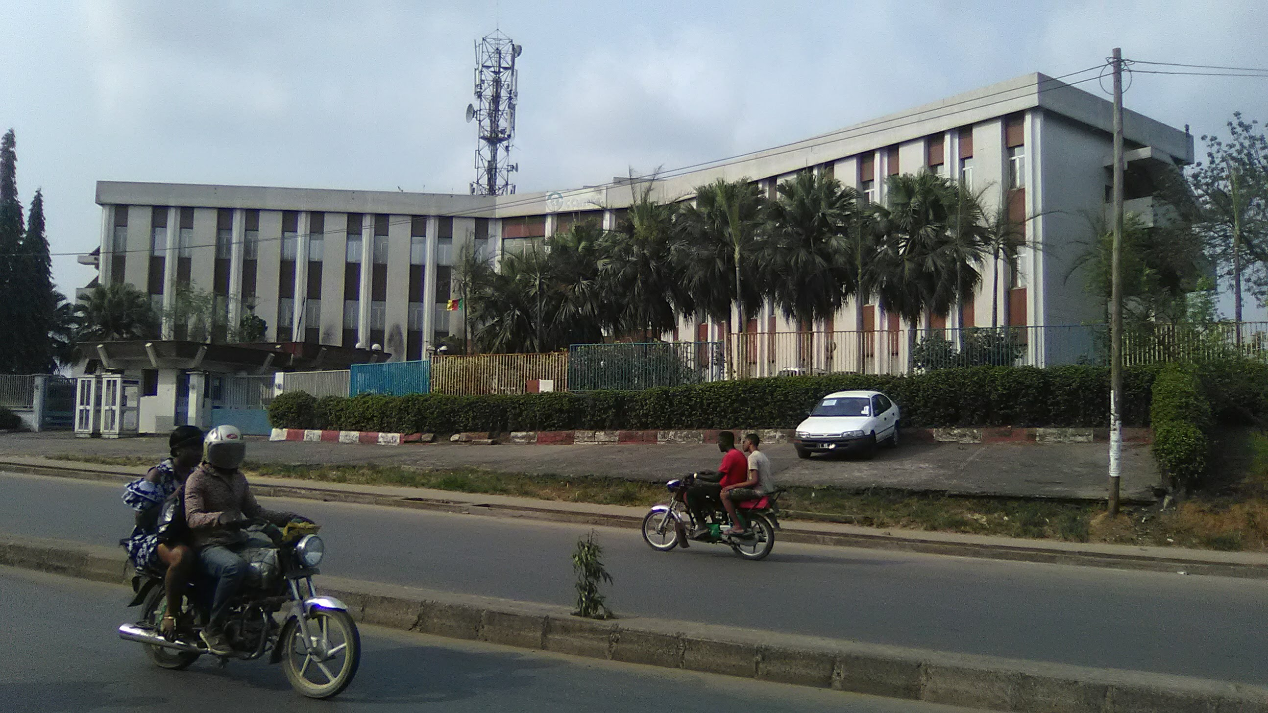 L'immeuble Camtel de Bépanda, vu de la route